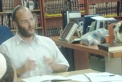 ליאור אנגלמן